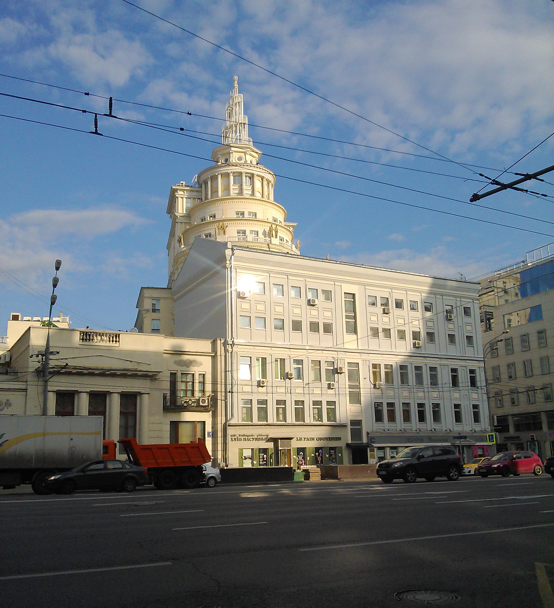 Bolshaya Sadovaya Street